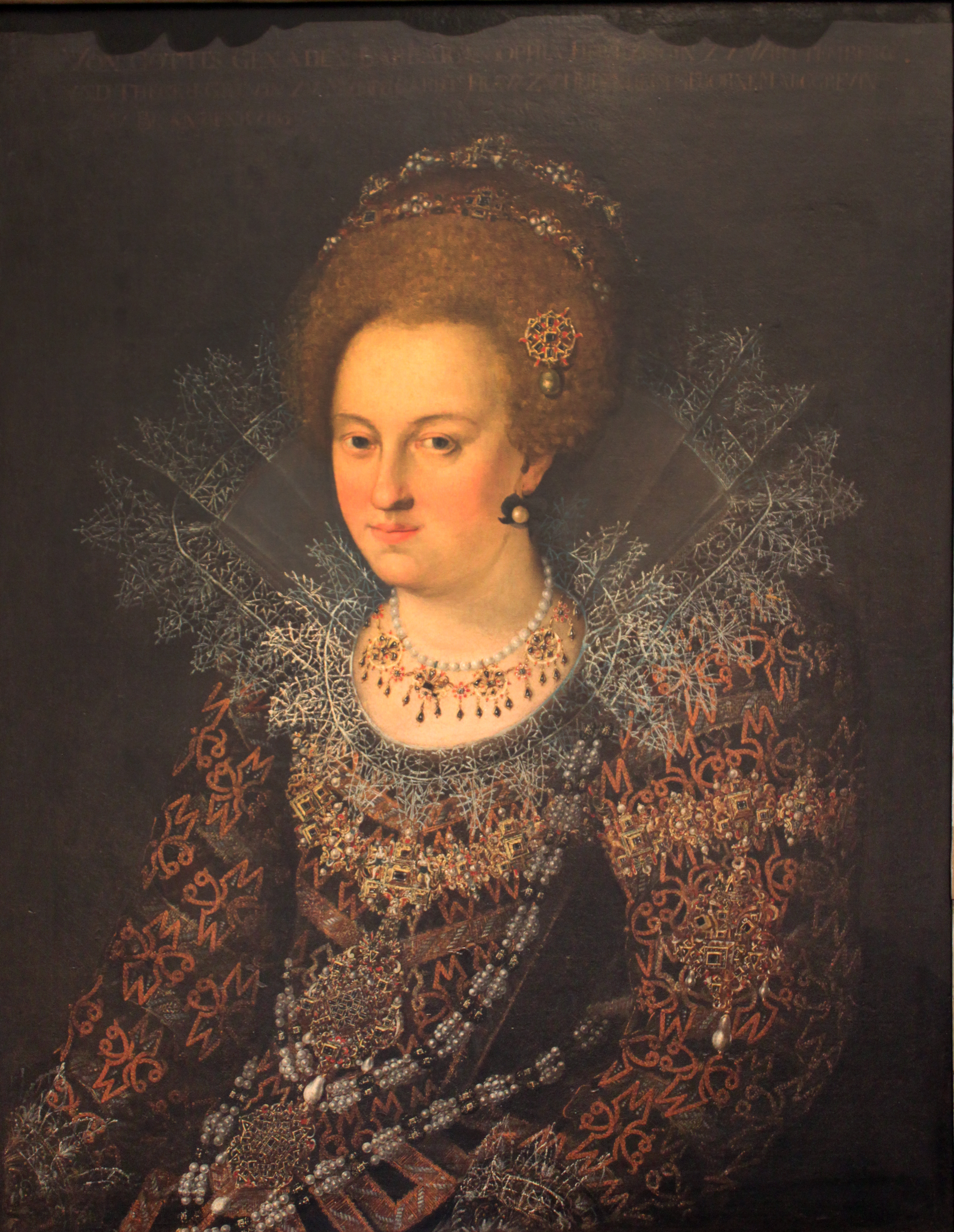 Sophia, Duchess of Württemberg (1584-1636)